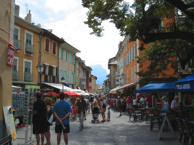 Het stadje Embrun in de Franse Alpen. De hoofdwinkelstraat met uitzicht op de berg Morgon.